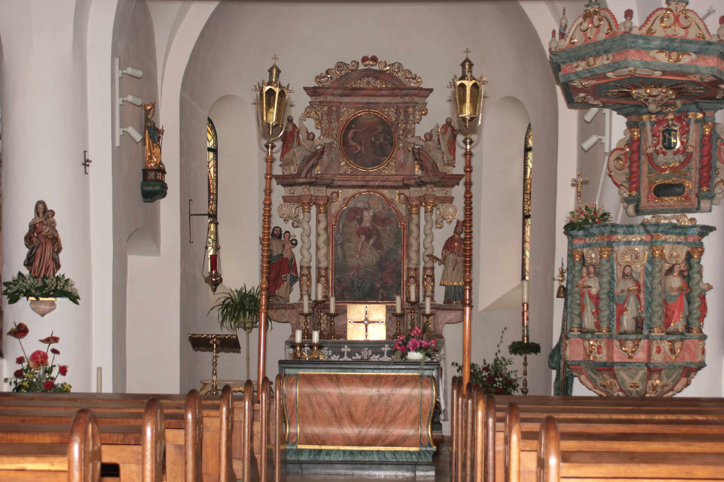 Altar in der Kirche Schliprüthen, Gemeinde Finnentrop eigenes Foto, Aufnahmedatum 11.07.2008 Wolfgang Poguntke,Wolfgang Poguntke (talk) 18:11, 21 July 2008 (UTC)